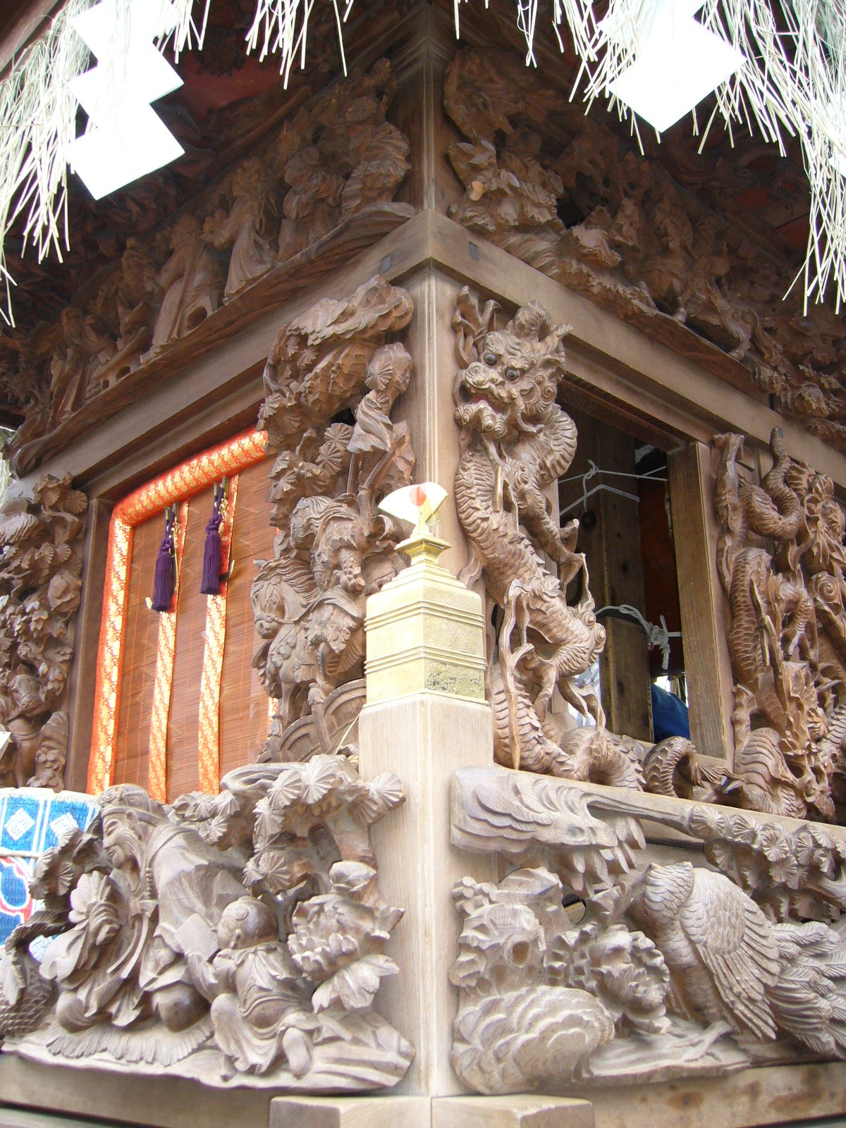 sculpture,minami-yokojyuku,sawara-float-festival,katori-city,japan